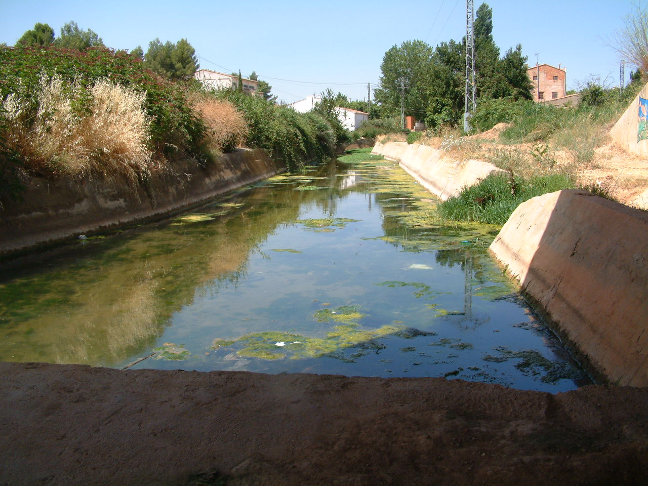 Río Madre en Caudete de las Fuentes (Valencia, España)